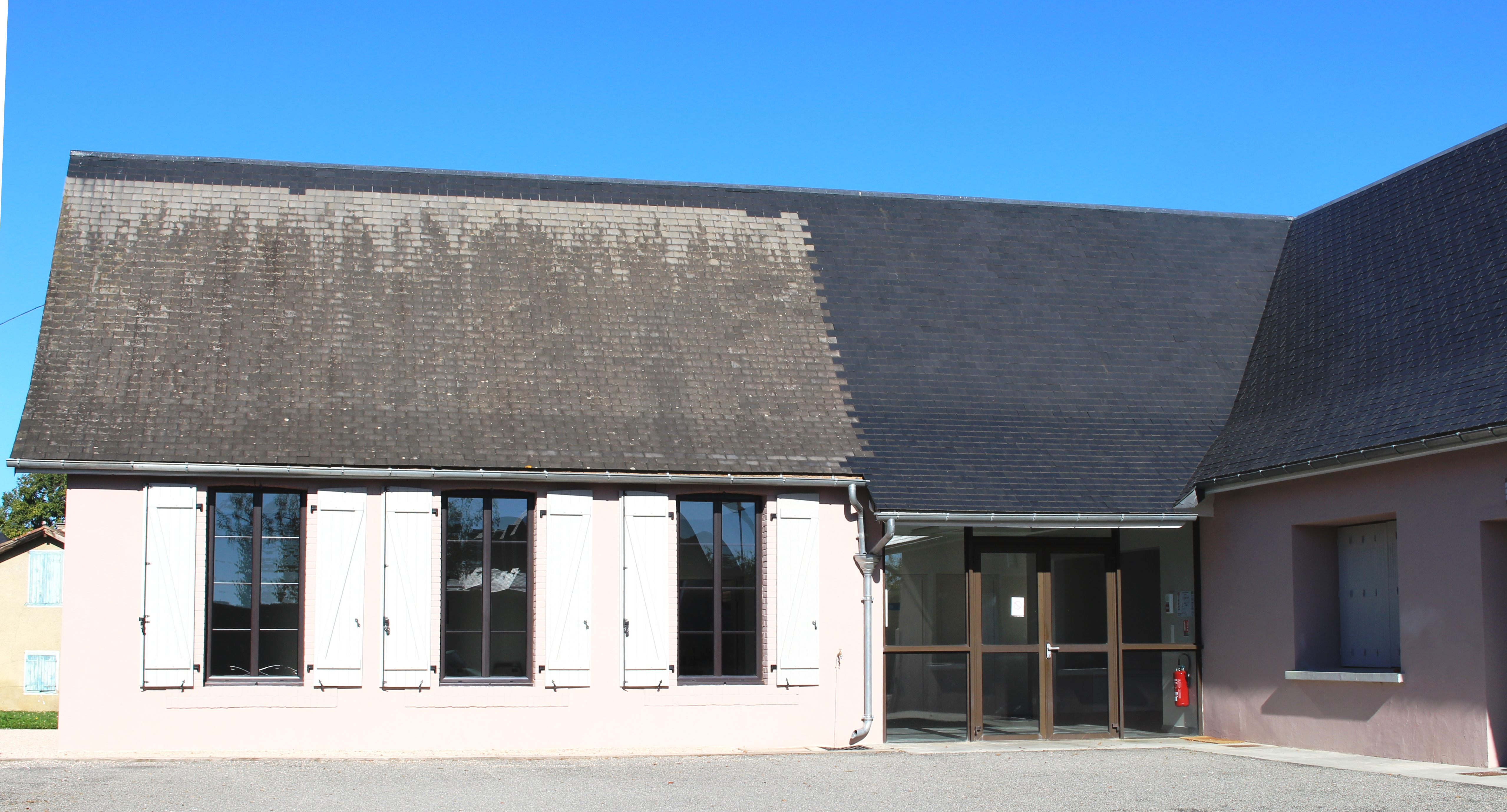 Salle des fêtes de Chelle-Spou (Hautes-Pyrénées)